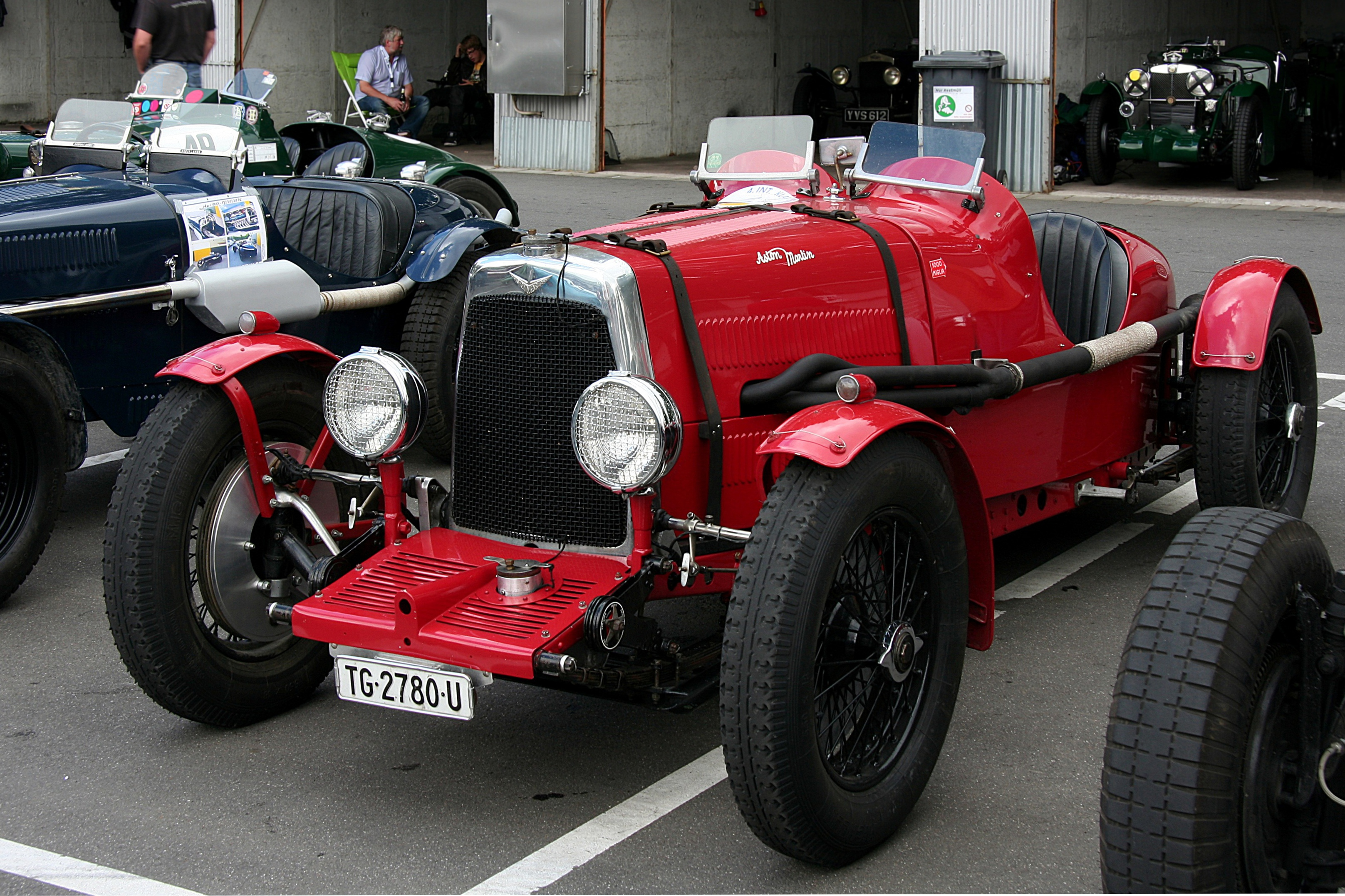 Aston Martin International, Baujahr 1930, 1500 cm³, beim Oldtimer Festival des DAMC 2008 im historischen Fahrerlager des Nürburgrings